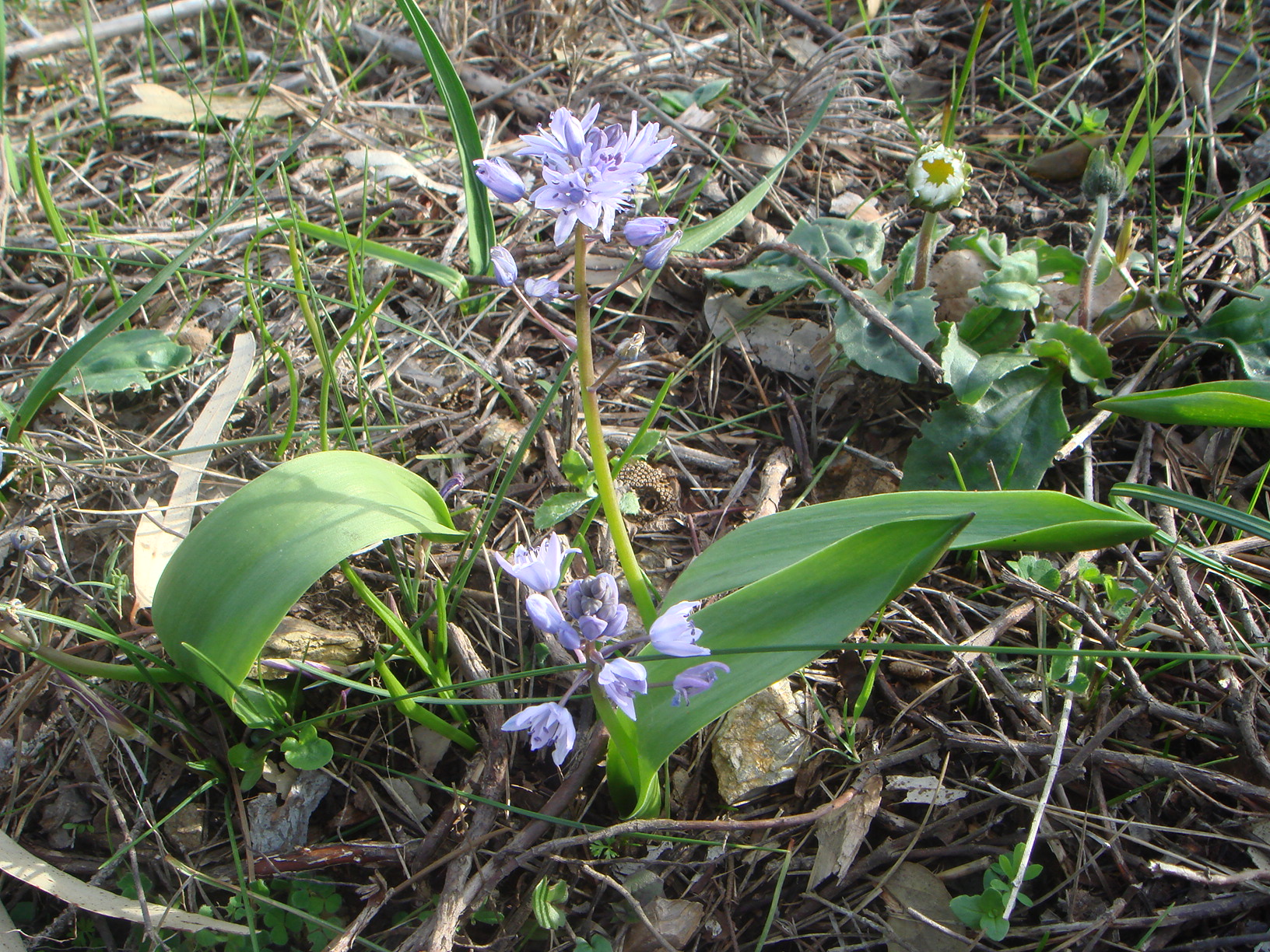 Scilla monophyllos, Ceuta, España